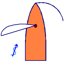 Binnen de windse koers met zeil over bakboord Eigen bewerking van het plaatje van voor de wind